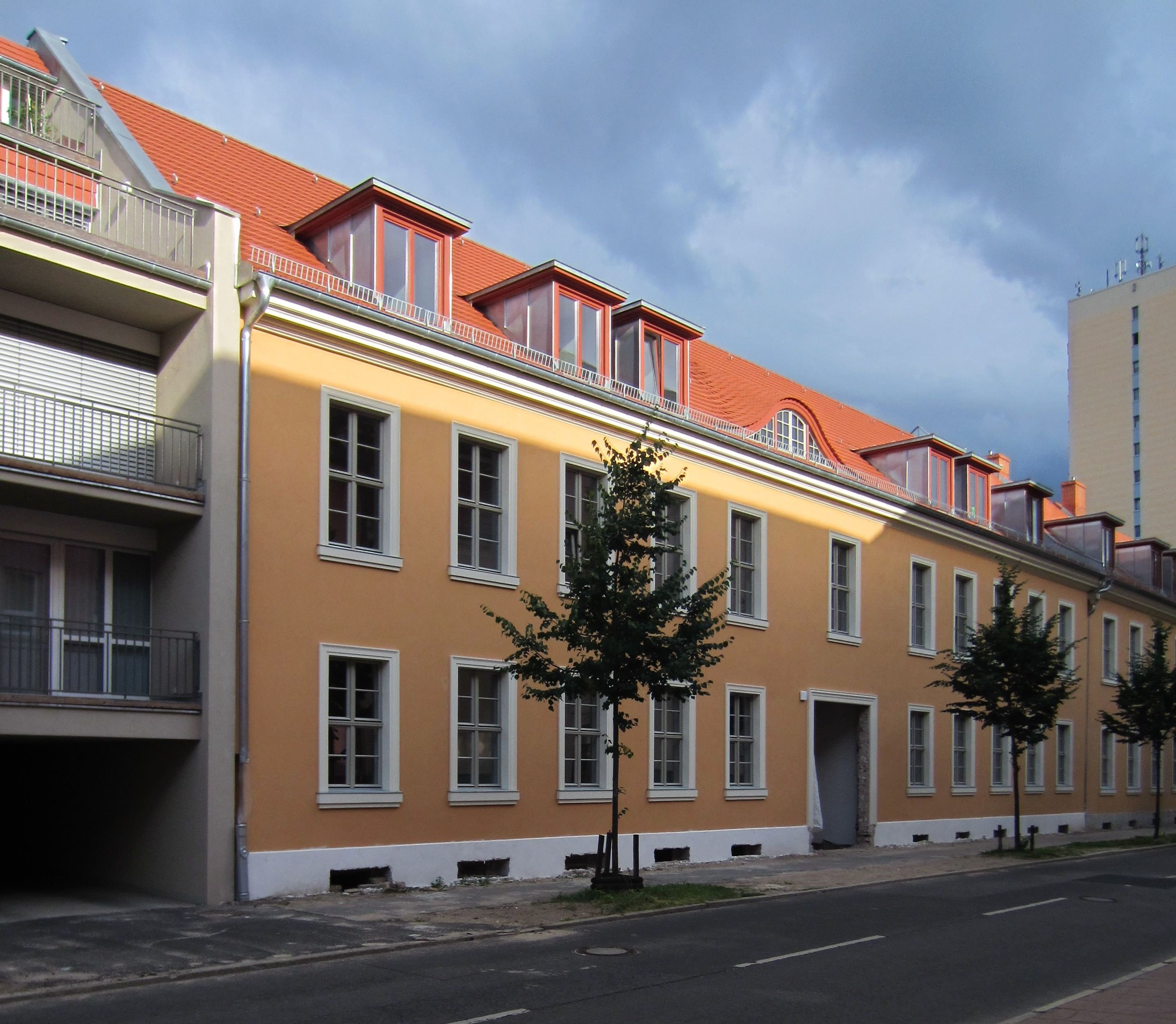 Denkmalgeschütztes ehemaliges Lazarettgebäude in Potsdam, Schopenhauerstraße 6